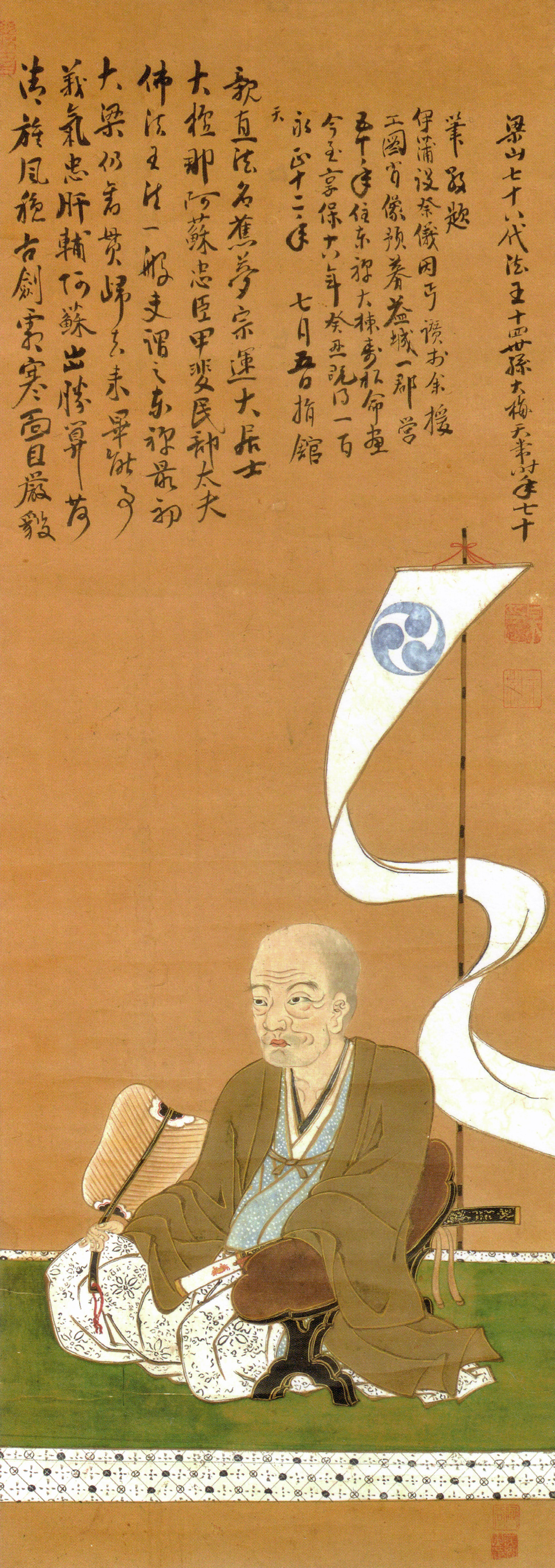 甲斐宗運像、享保18年（1733年）作